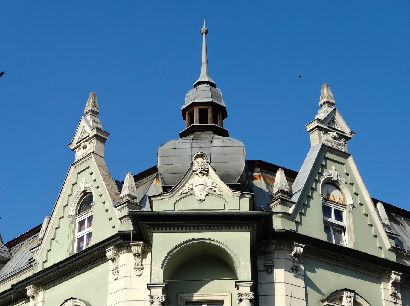 Kamienica przy ul. Cieszkowskiego 24 – Pomorska 50 w Bydgoszczy (1896-1899, Karl Bergner)